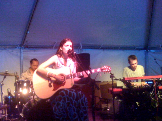 La chanteuse franco-israélienne Yael Naim Atlantic Sampler Party - Austin, Texas